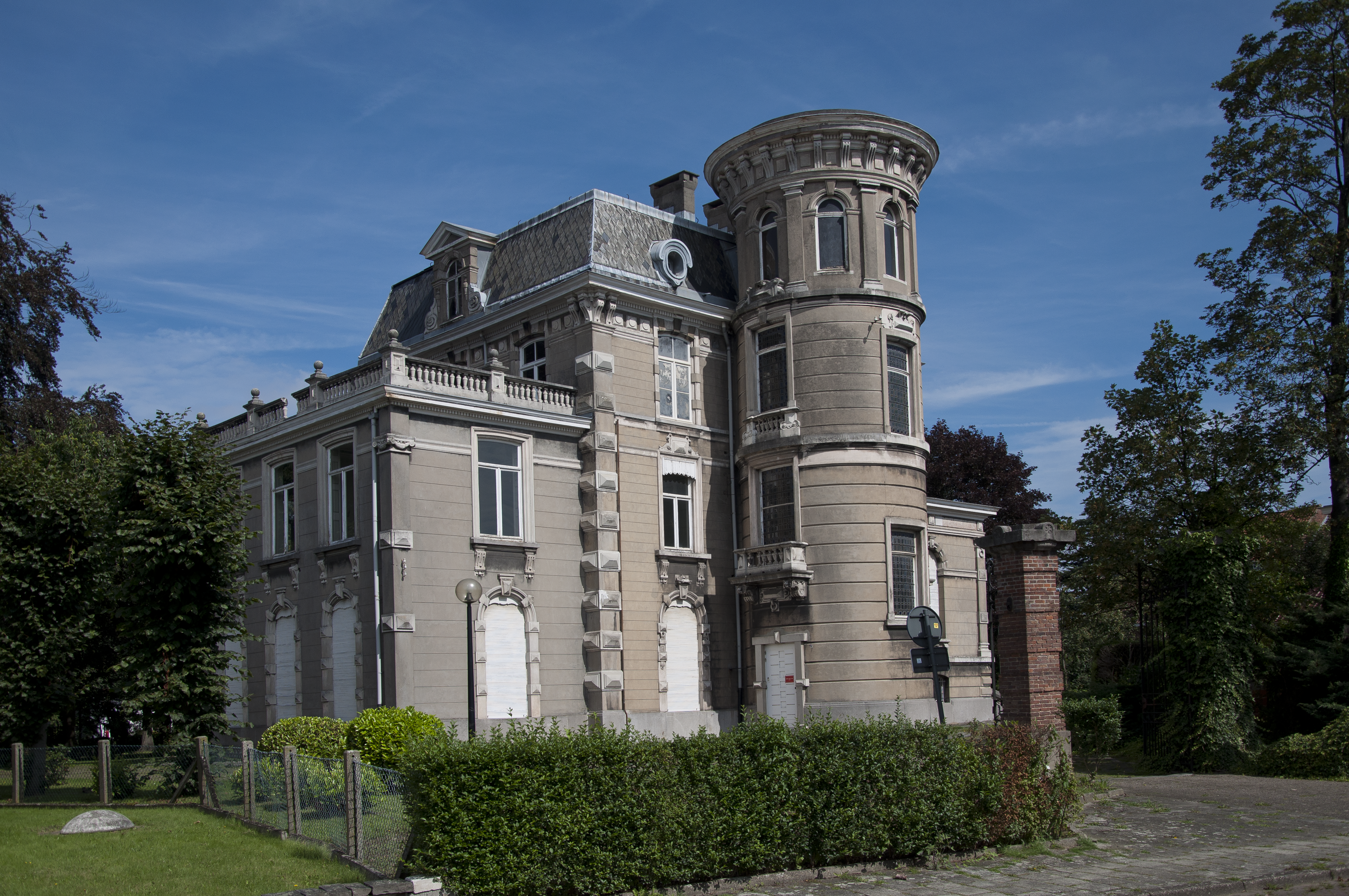 Kasteel de Pélichy te Gentbrugge, België